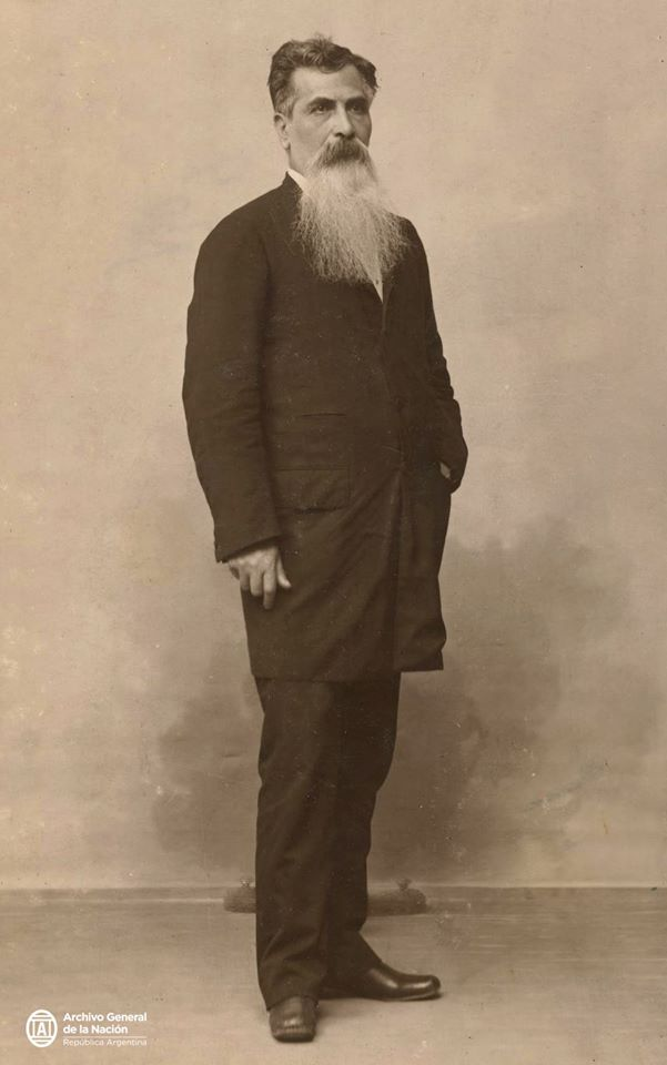 Fotografía de Leandro N. Alem de cuerpo entero.